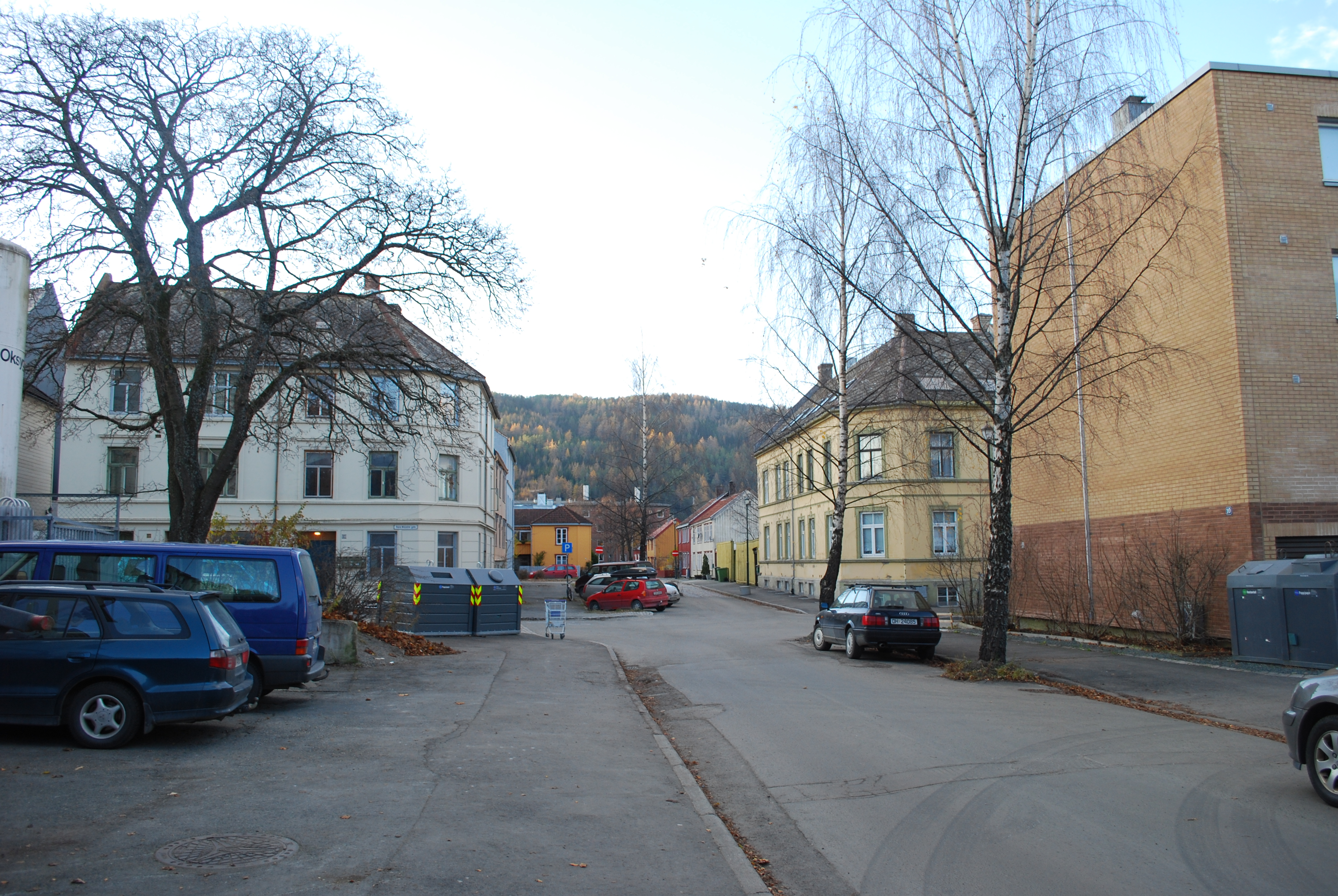 Skolegata in Ila, Trondheim, Norway.